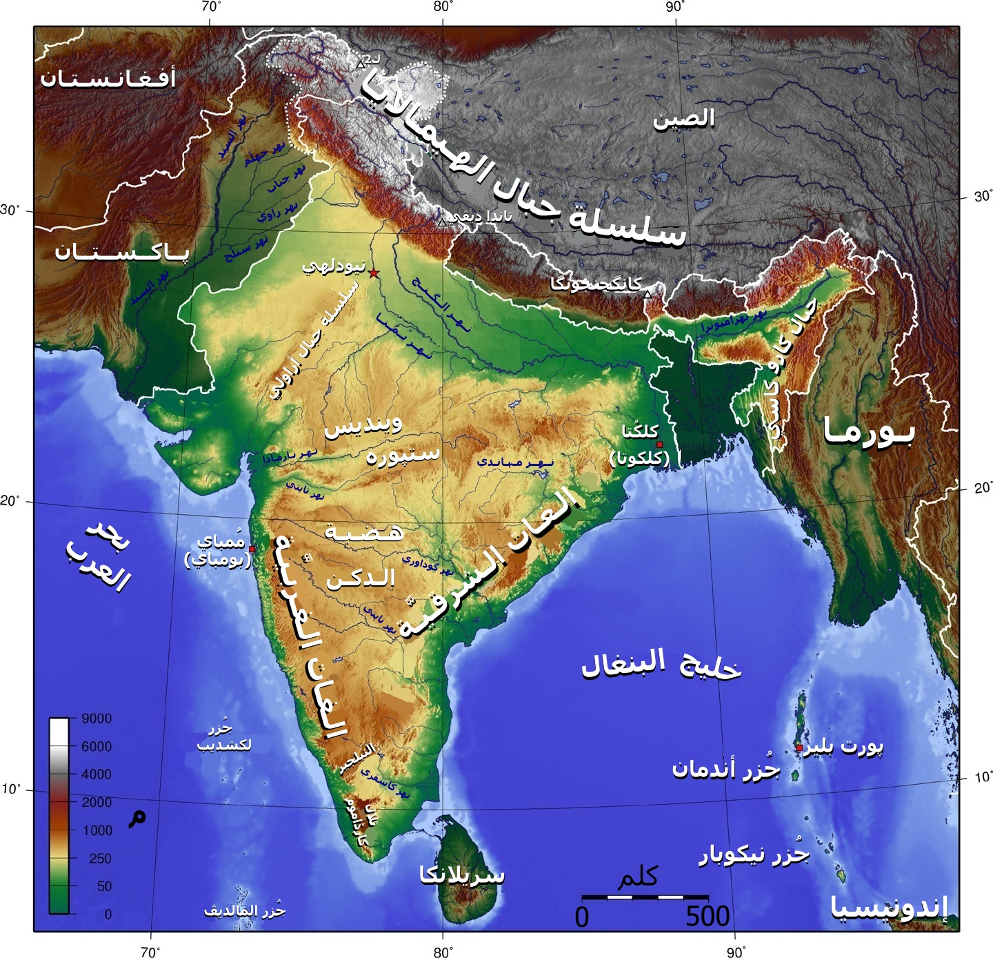 خارطة تُبيِّن جبال وأنهار الهند.